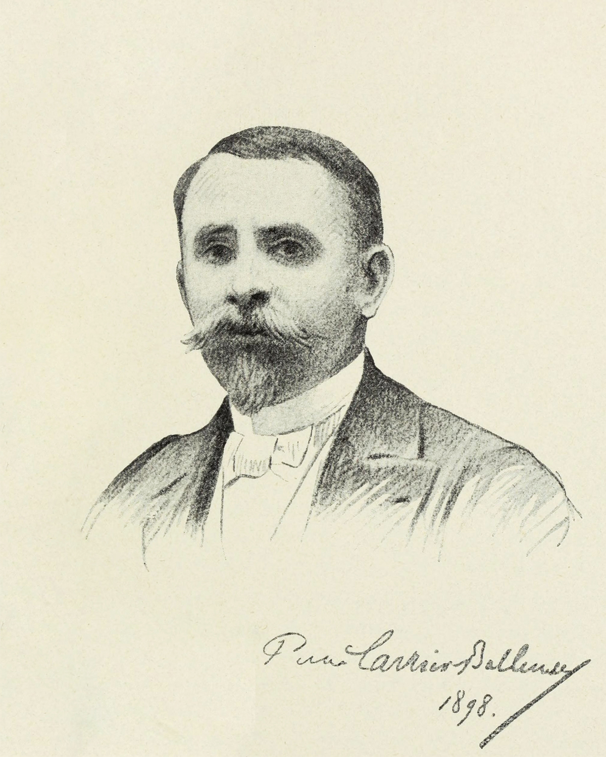 Portrait du peintre français Pierre Carrier-Belleuse (1851-1932) dessiné par lui-même. Le dessin porte la signature de l'artiste, et la date 1898.